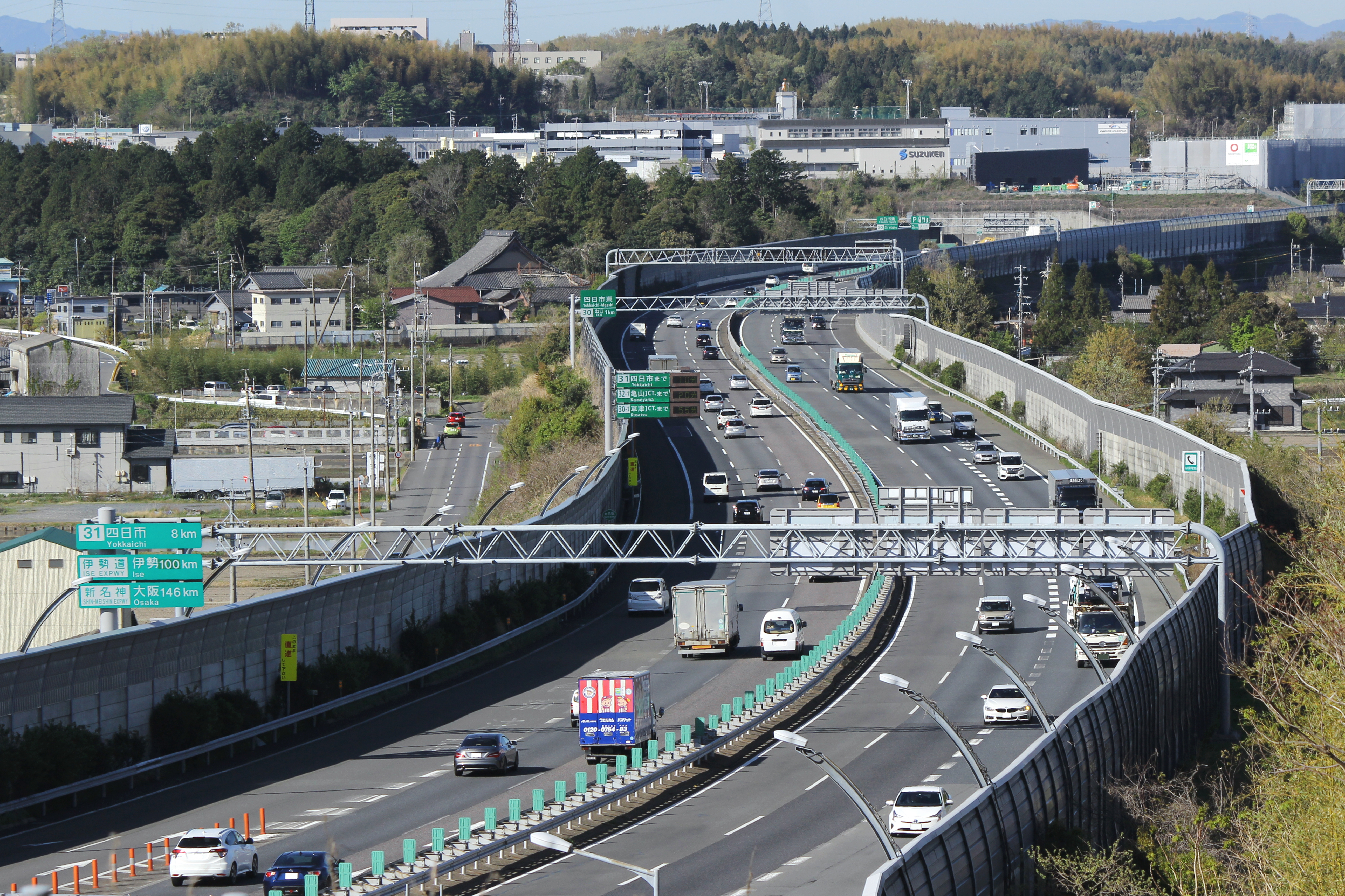 E23東名阪自動車道（亀山方面）を四日市ジャンクションから望む。